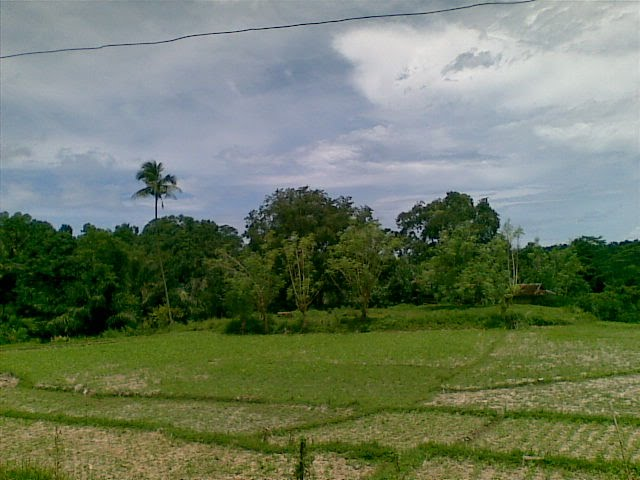 Sawah Nyalindung